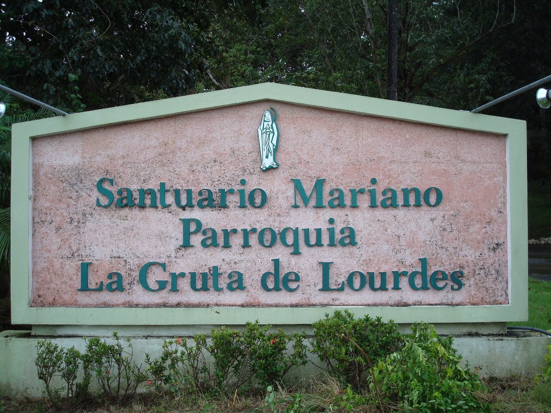 Entrada Gruta de Lourdes